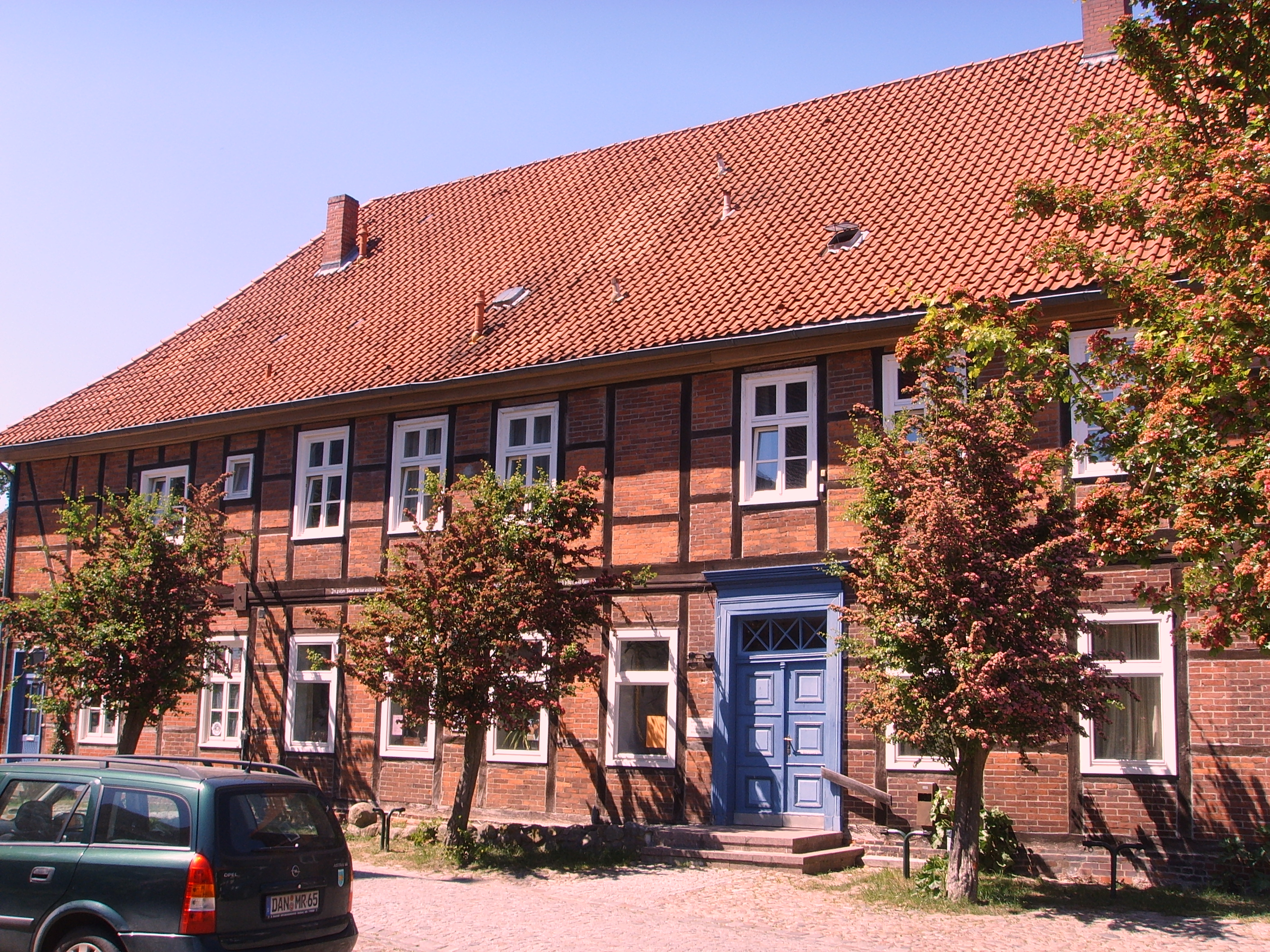 Geburtshaus des Geographen Bernhard Varenius in Hitzacker (Elbe), An der Kirche 7